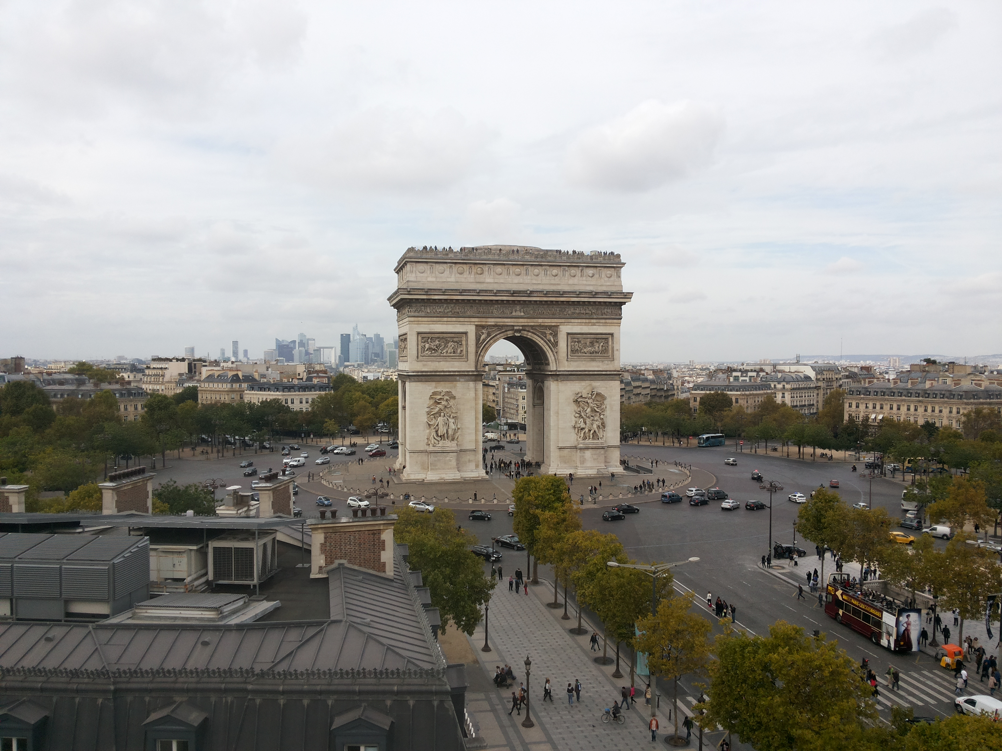 La place Charles-de-Gaulle - Étoile, avec l'Arc de triomphe, et la Défense en arrière-plan.